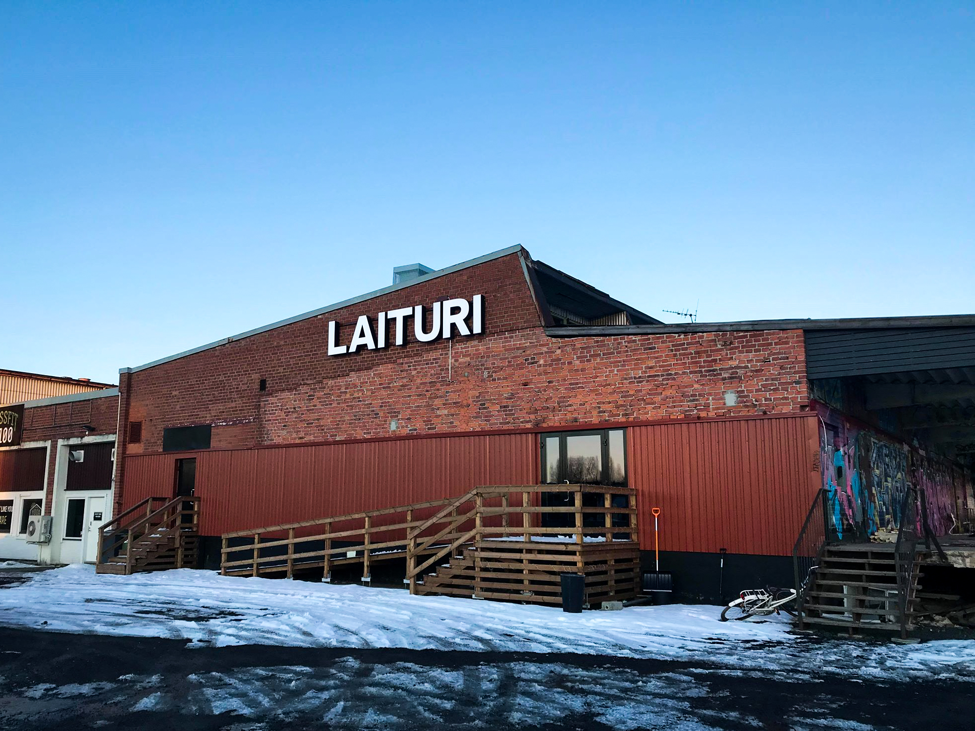 Houm Church-seurakunnan Laituri-tila Seinäjoella.